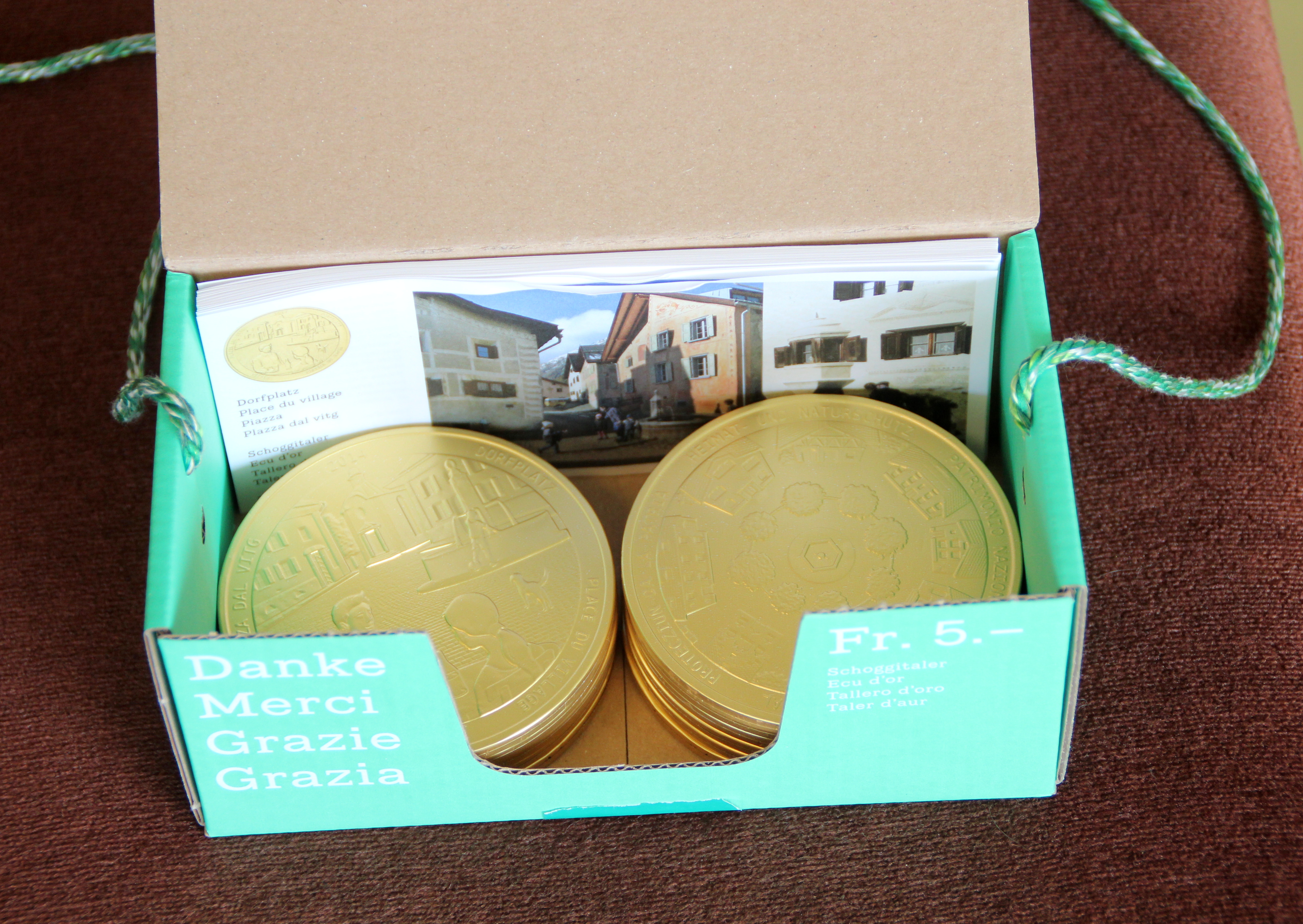 Verkaufsschachtel mit Talern und Informationsblättern 2014